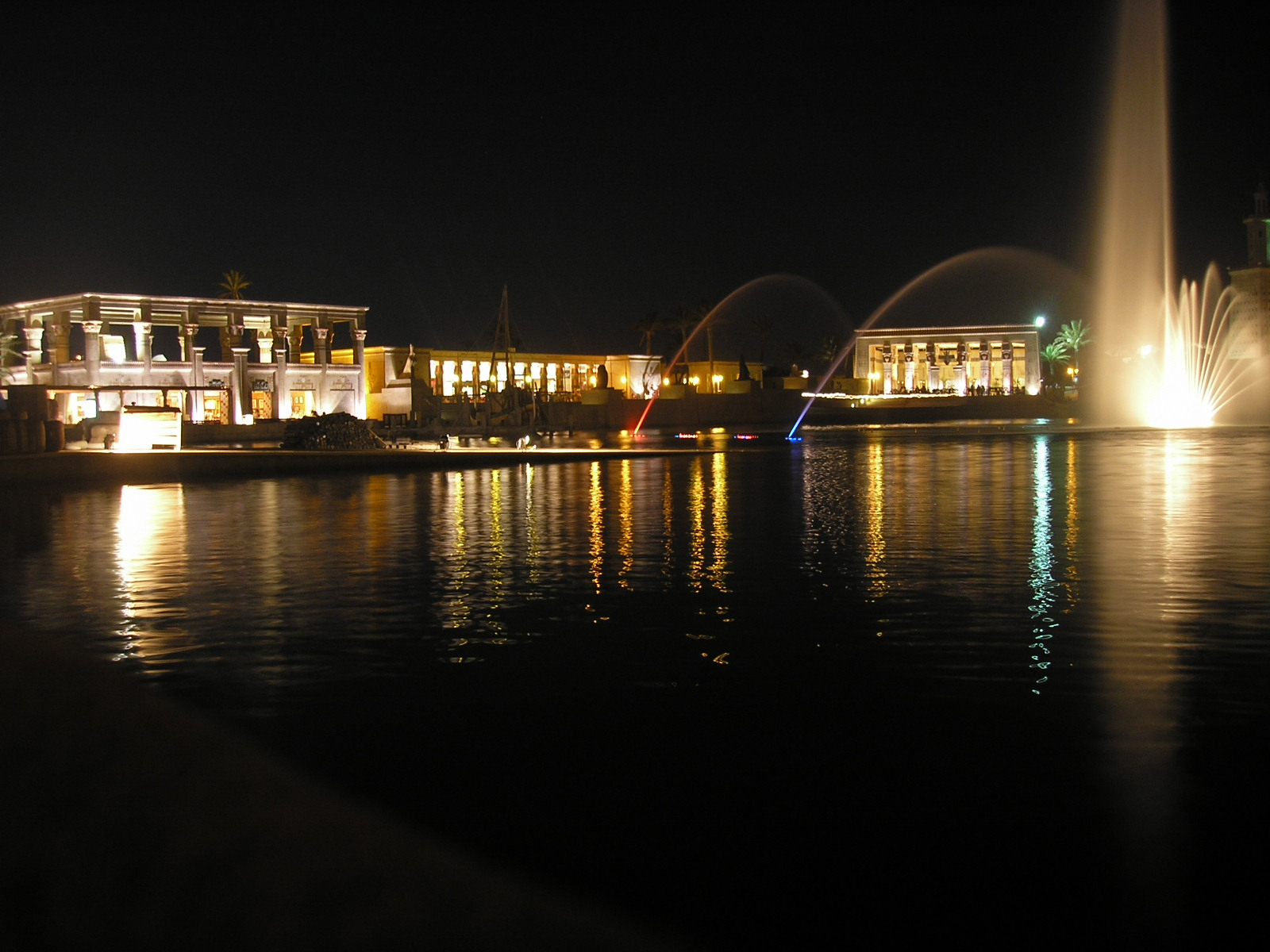 Vista d'Egipte al 2006, per la nit